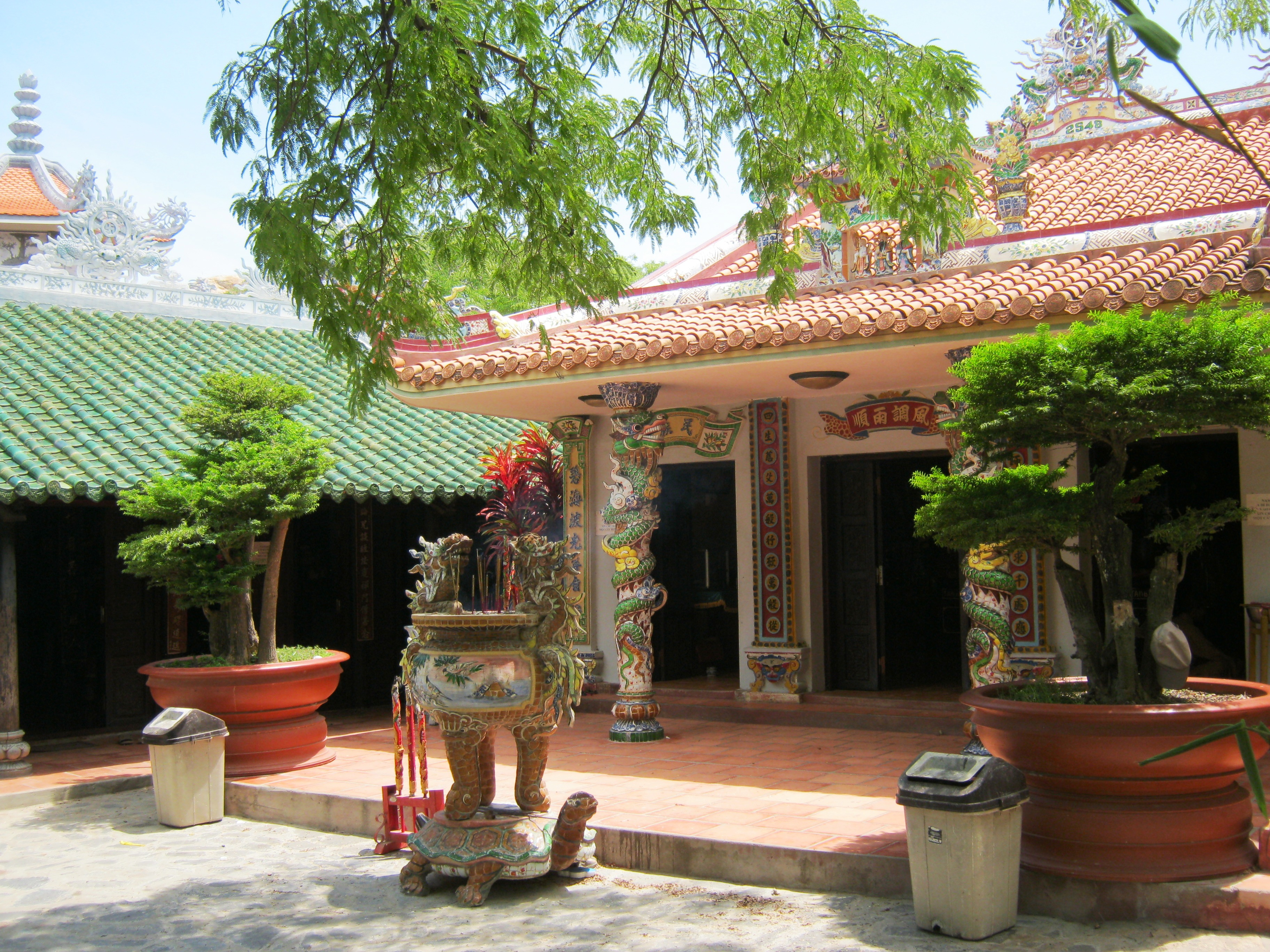 Chánh điện chùa Cổ Thạch tọa lạc ở xã Bình Thạnh, huyện Tuy Phong, tỉnh Bình Thuận. Đây là một di tích, và là một thắng cảnh nổi tiếng cấp quốc gia Việt Nam.